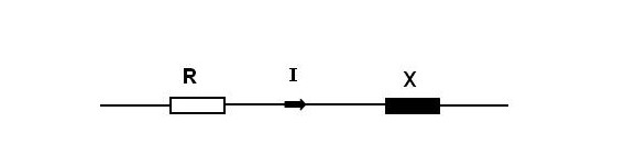 tekening van leidingelementen in een elektriciteitsleiding